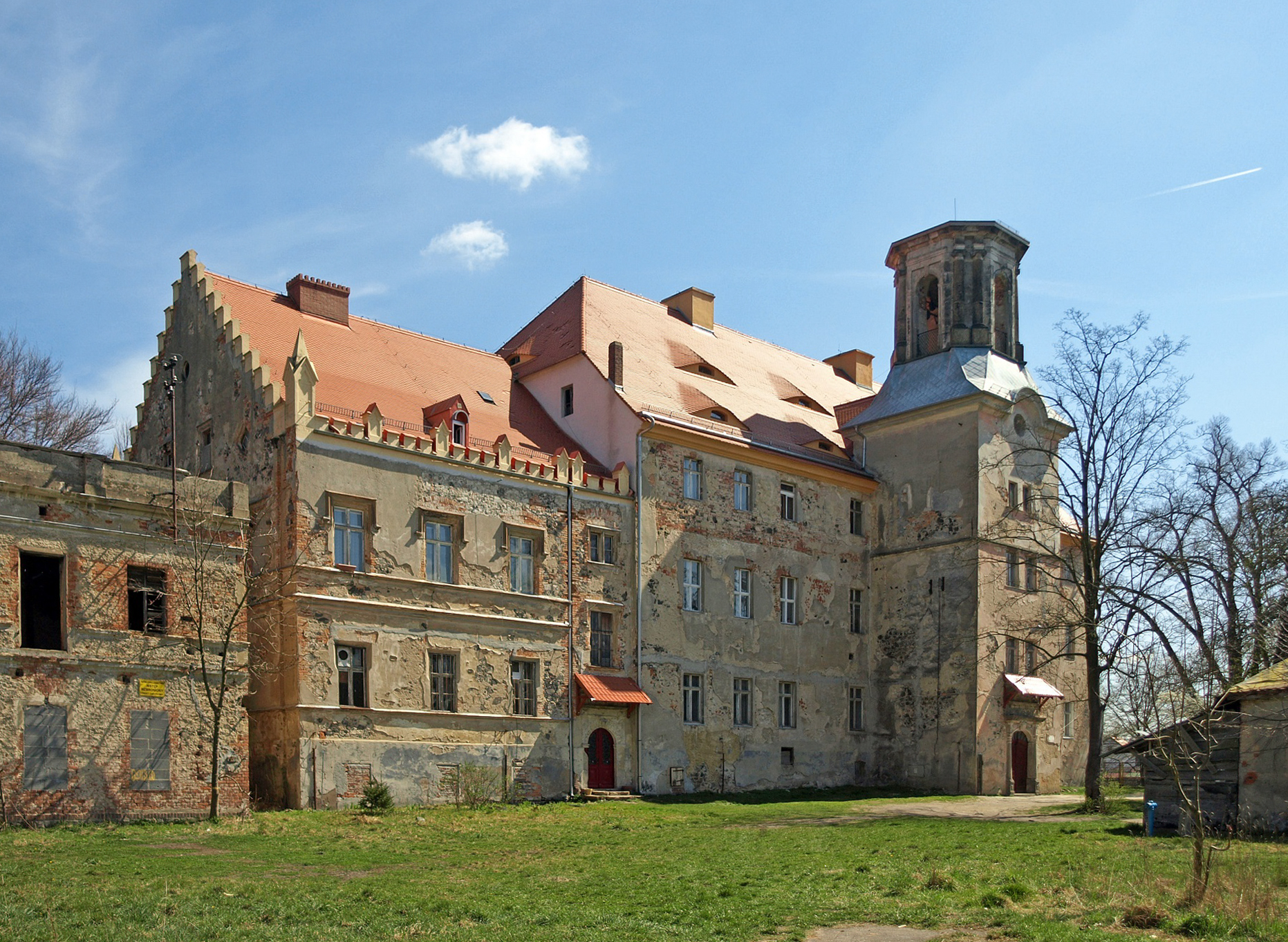 Schloss Kuhna